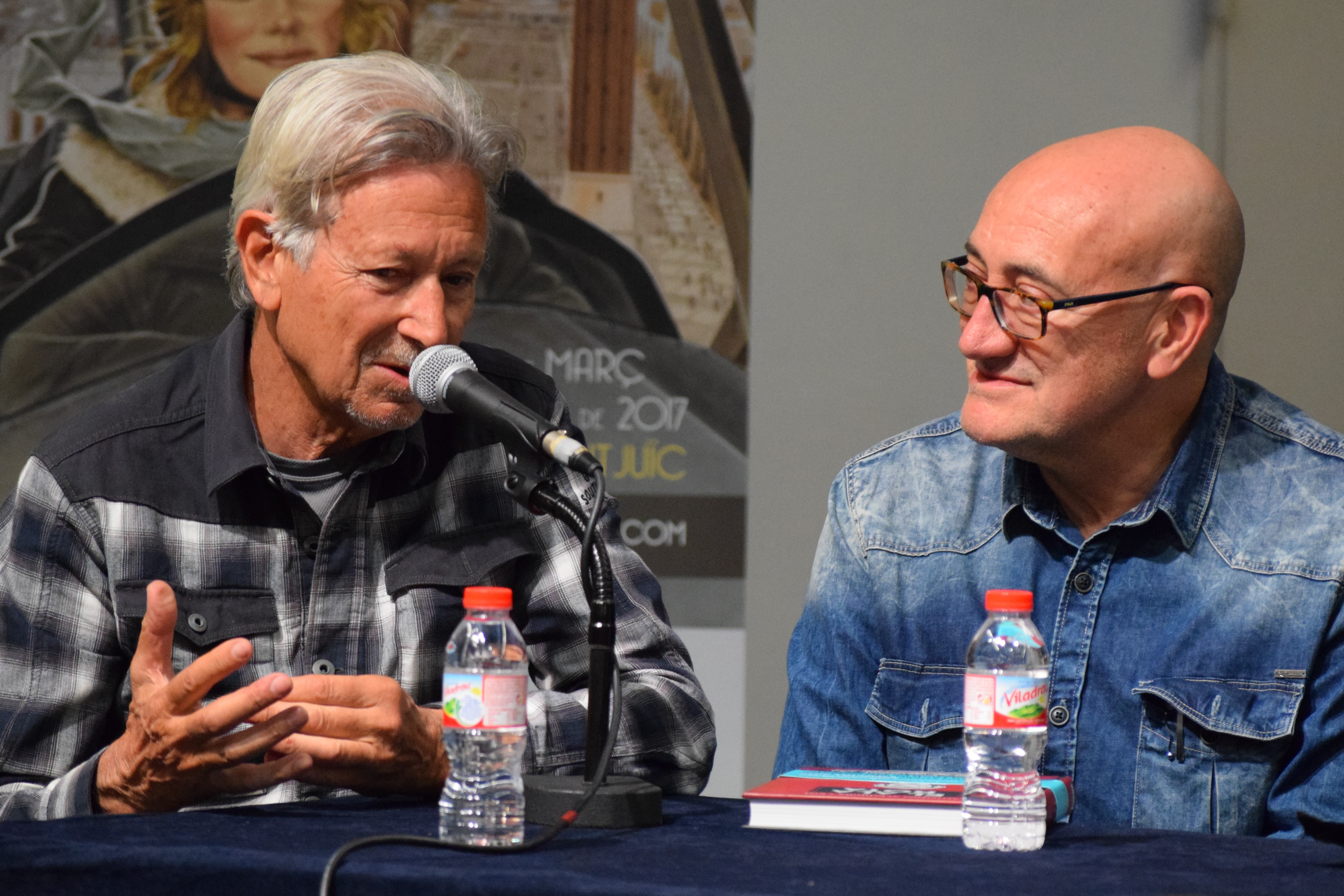 Kim i Antonio Altarriba presentant el còmic El ala rota, nominat al premi a la millor obra. Saló Internacional del Còmic de Barcelona de 2017. Divendres 31 de març de 2017.